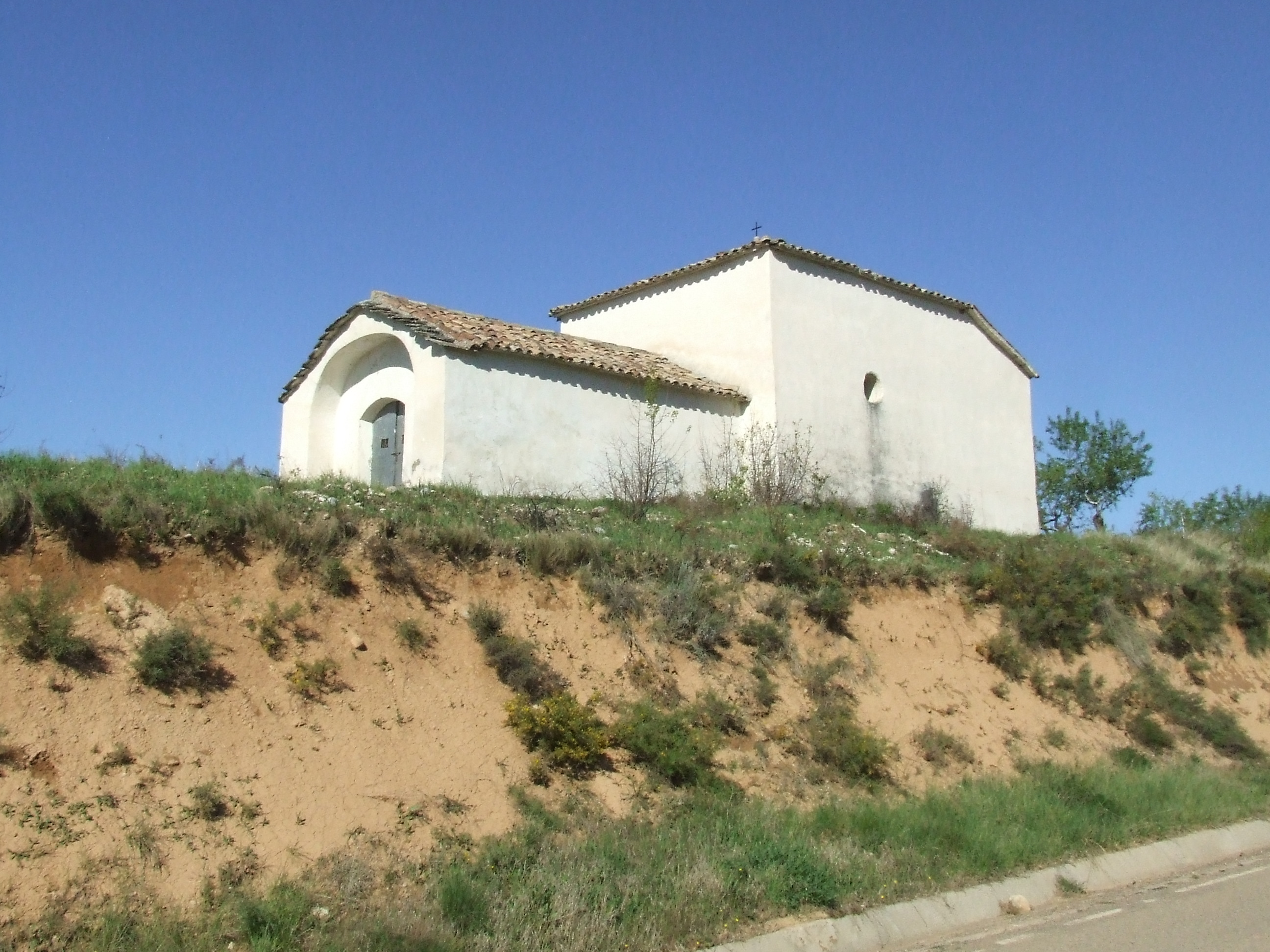 L'ermita del Calvari (Talarn, Pallars Jussà)